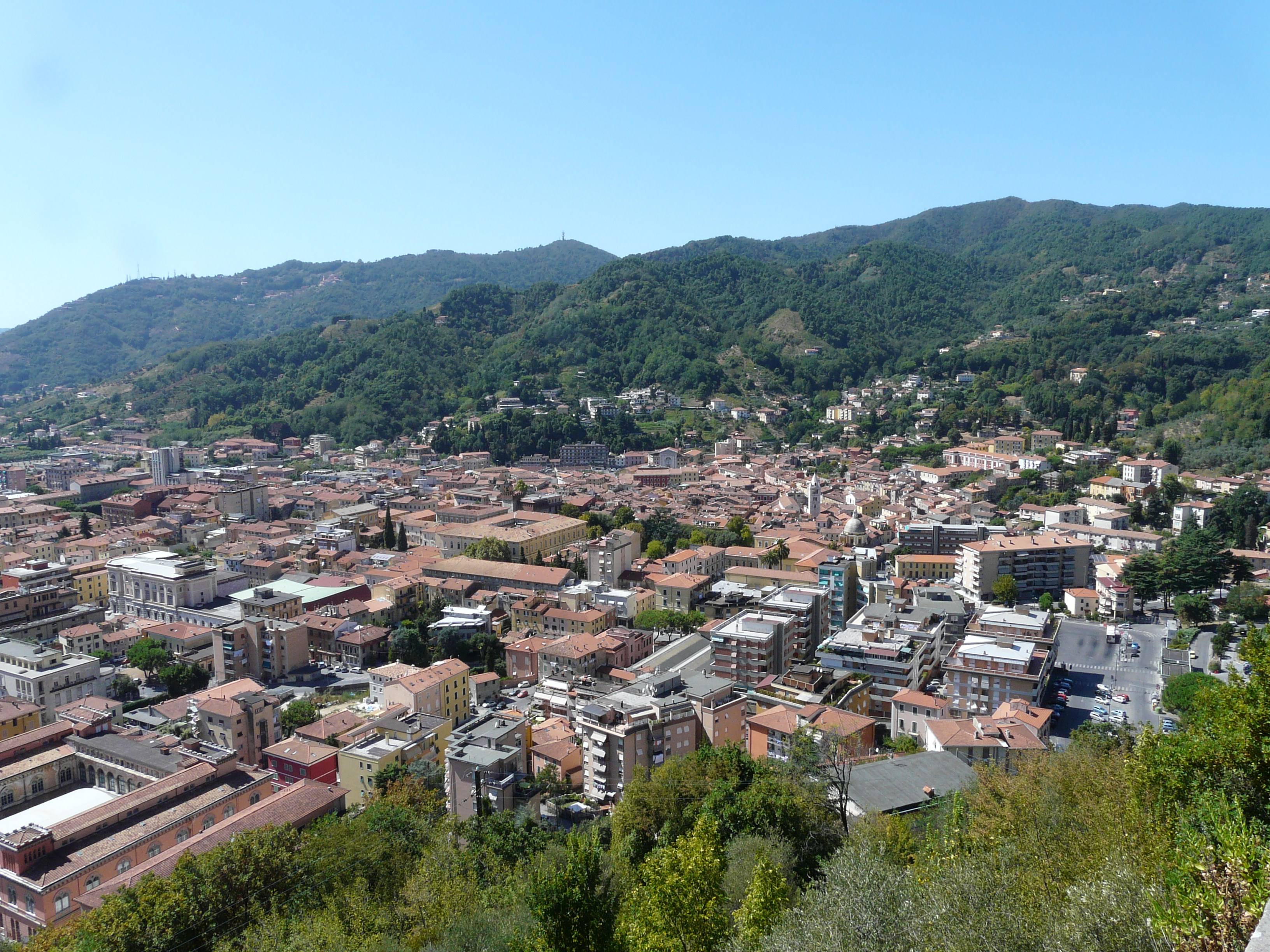 Panorama di Carrara dalla strada per Colonnata, Toscana, Italia